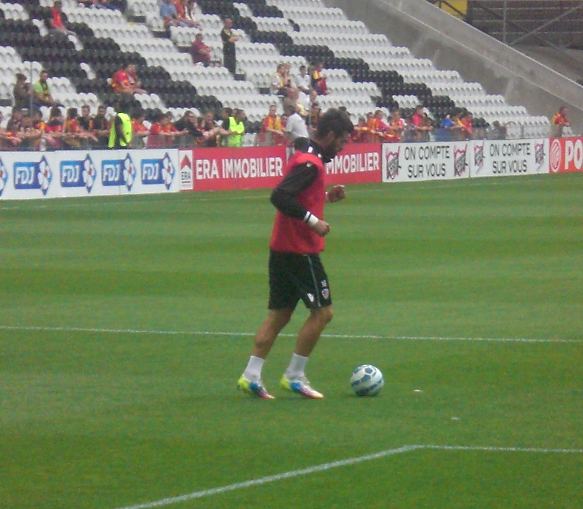 Anthony Scribe avant le match Lens / AC Ajaccio, le 11 août 2015, au Stade Bollaert-Delelis, comptant pour le premier tour de la Coupe de la Ligue française de football.